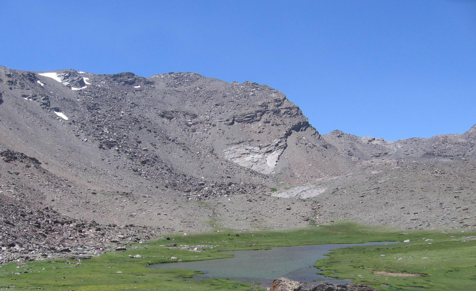 Mont Mulhacen Juillet 2007